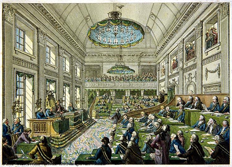 uit atlas van Stolk Rotterdam van 1796